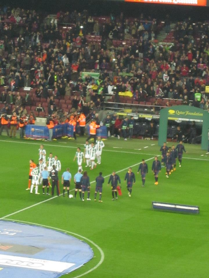 Partido de Copa del Rey disputado entre el Córdoba y el FC Barcelona.